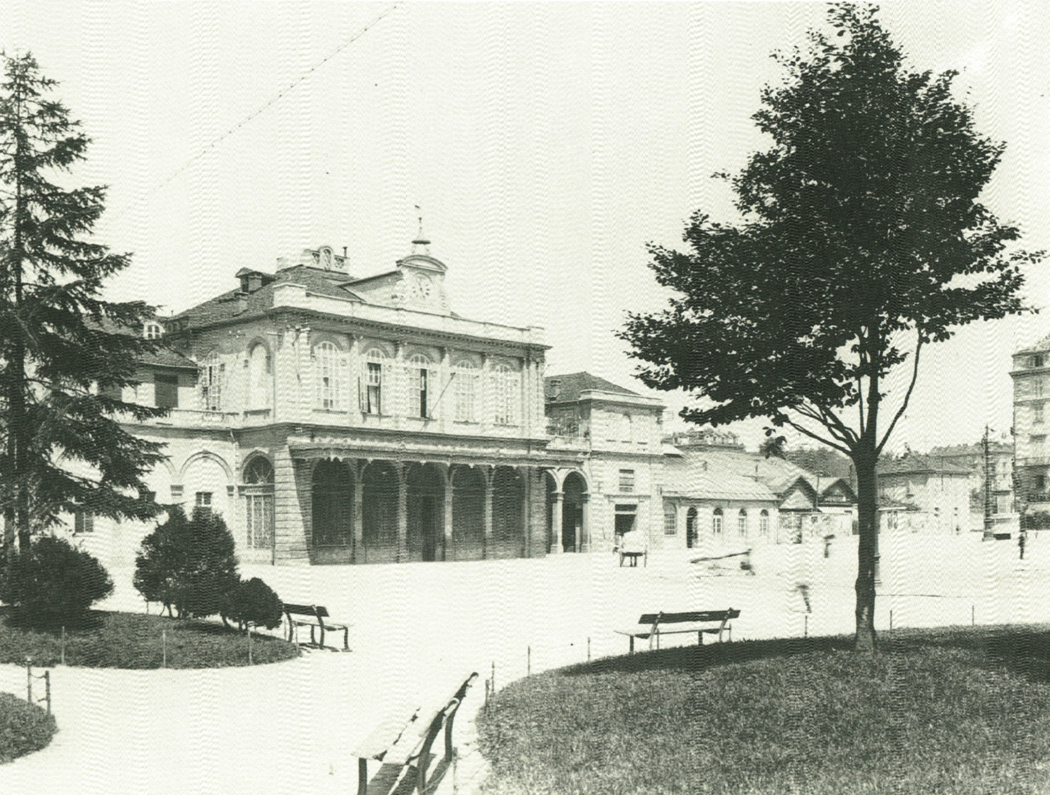 Stazione di Torino Porta Susa nel 1926.